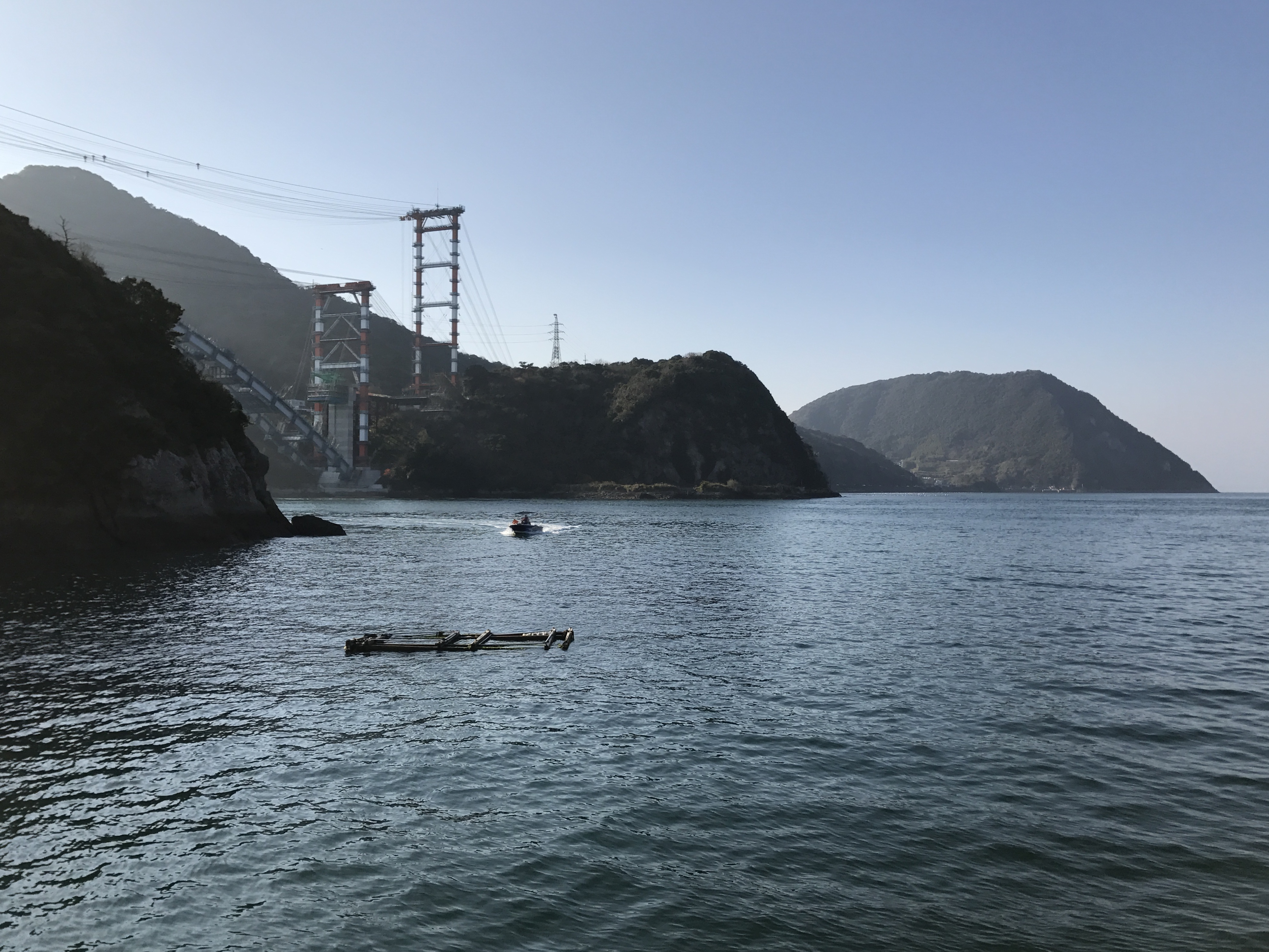 熊本県宇城市三角町三角浦の本町漁港付近より望む天門橋と大矢野島北端の柴尾山